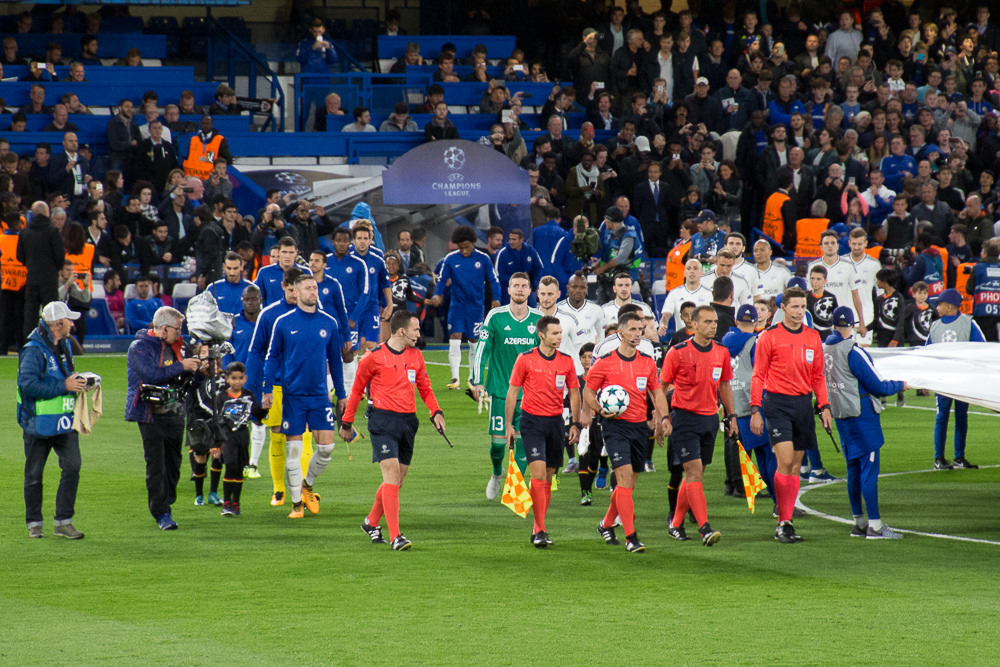 Chelsea 6 Qarabag 0